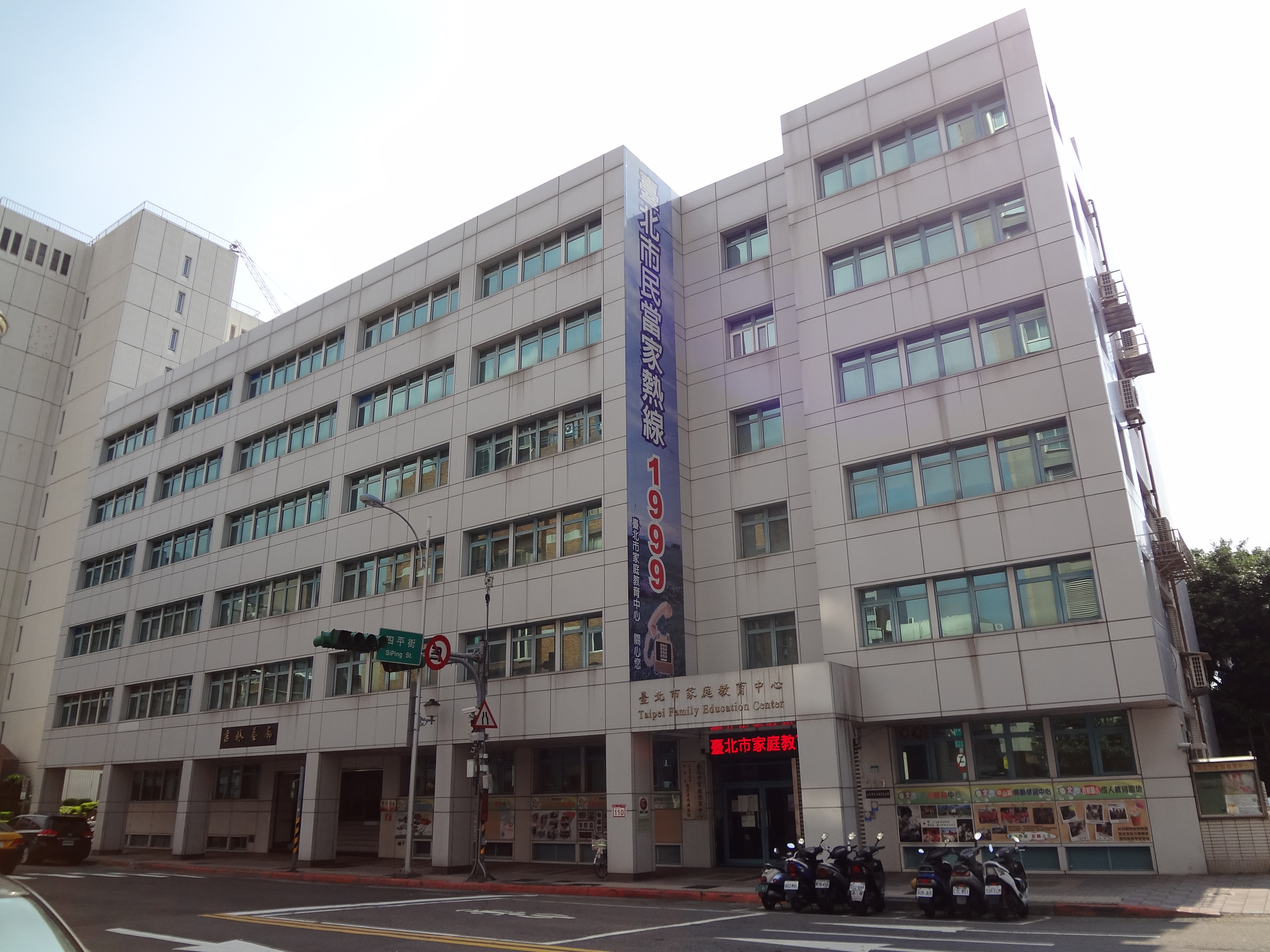 臺北市家庭教育中心大樓，位於臺北市中山區吉林路110號，1樓為吉林藝廊，3樓為臺北市學生輔導諮商中心，5樓為臺北市家庭教育中心，6樓為臺北市政府教育局教育資料典藏館（2009年2月25日開館）。